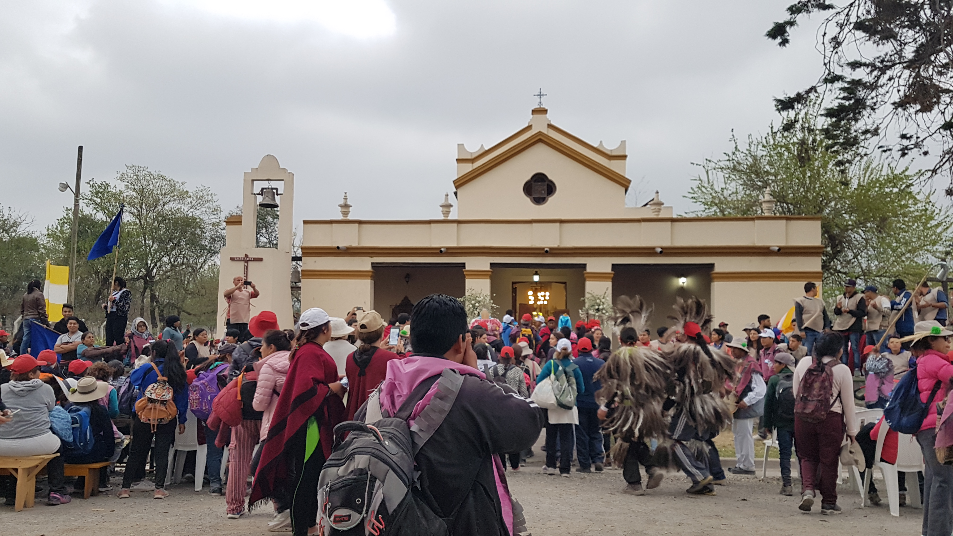 Iglesia que data de los años 1900, tiene como patrona a la Virgen de la Inmaculada Concepción. Su fiesta patronal se realiza el 8 de diciembre.fachada de iglesia